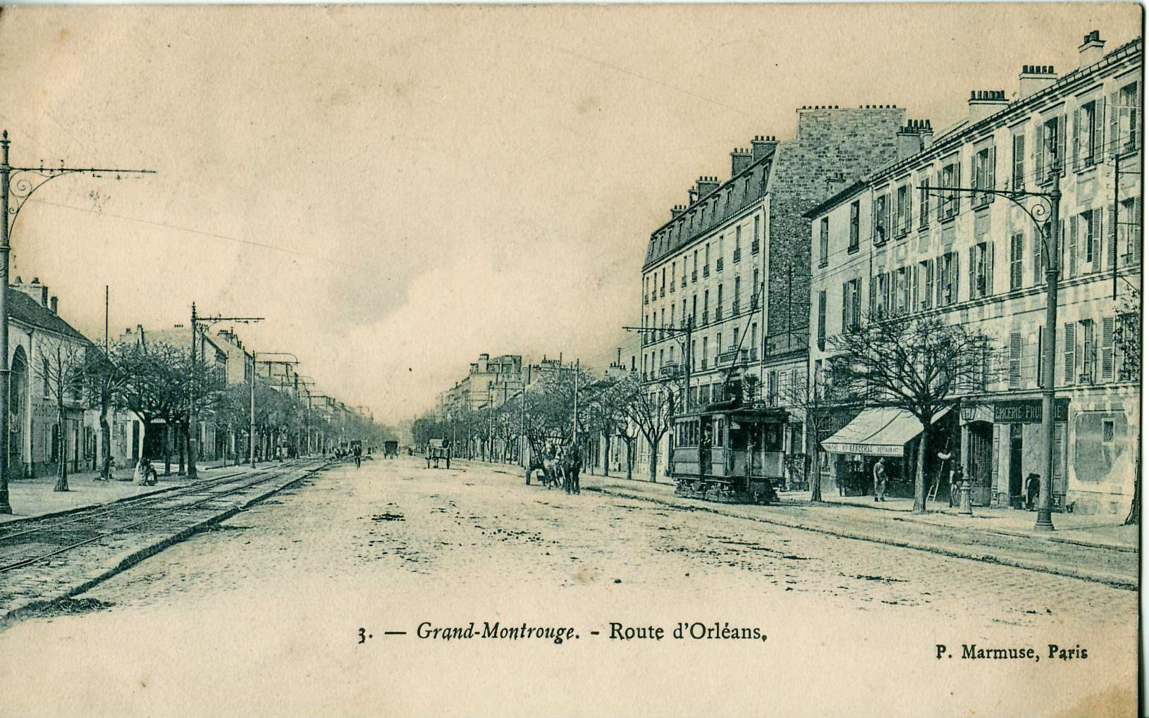 Carte postale éditée par Marmuse, N°3Grand Montrouge - Route d'OrléansVue du tramway "Arpajonnais" sur la RN 20